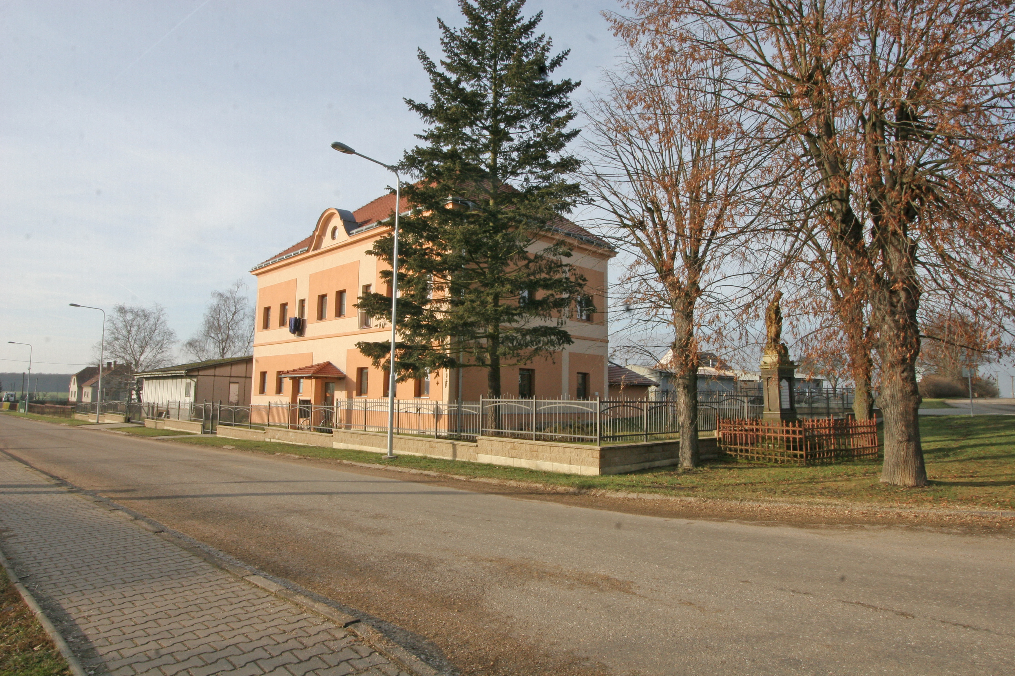 Lodín - bývalá škola